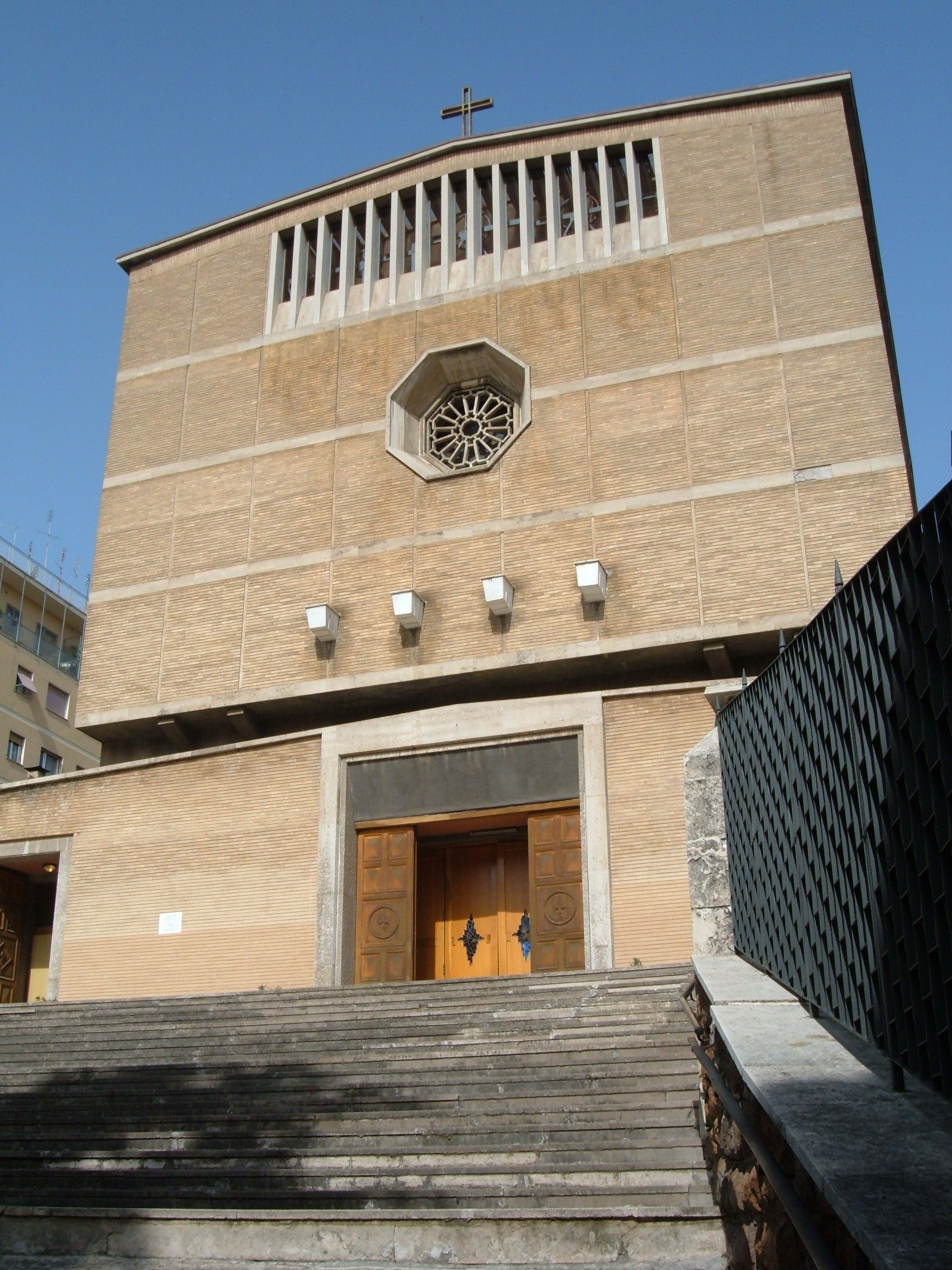 San Pio X (Rome)